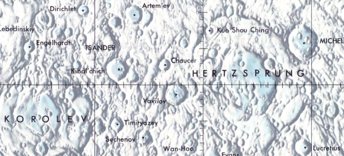 Cráter lunar Vavilov. Localización. (Lunar Chart LPC1. Second Edition)